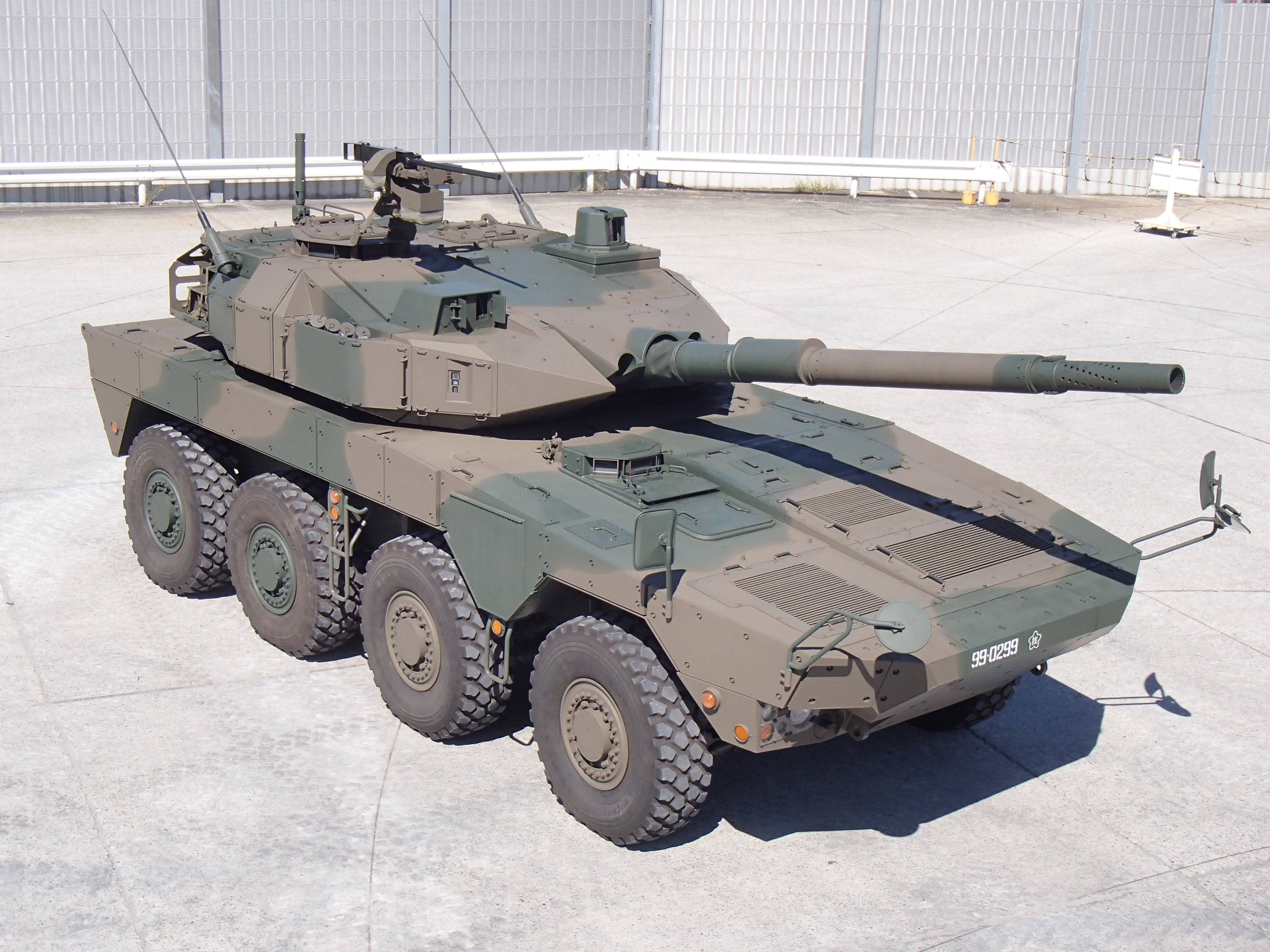 機動戦闘車 多様な事態への対処において、空輸性・路上機動性に優れた機動力をもって展開するとともに、中距離域での直接照準射撃により軽戦車等を含む敵装甲戦闘 車両等を撃破するための装備品です。 現在、防衛省技術研究本部において試験中であり、平成２８年度に装備化される予定です。 性能・諸元 乗員：4名 全備重量：約26t 全長：8.45m 全幅：2.98m 全高：2.87m 最高速度：100km/h エンジン：水冷4サイクル4気筒 ディーゼル機関 570ps/2,100rpm 武装：105mm砲 12.7mm重機関銃 74式7.62mm機関銃